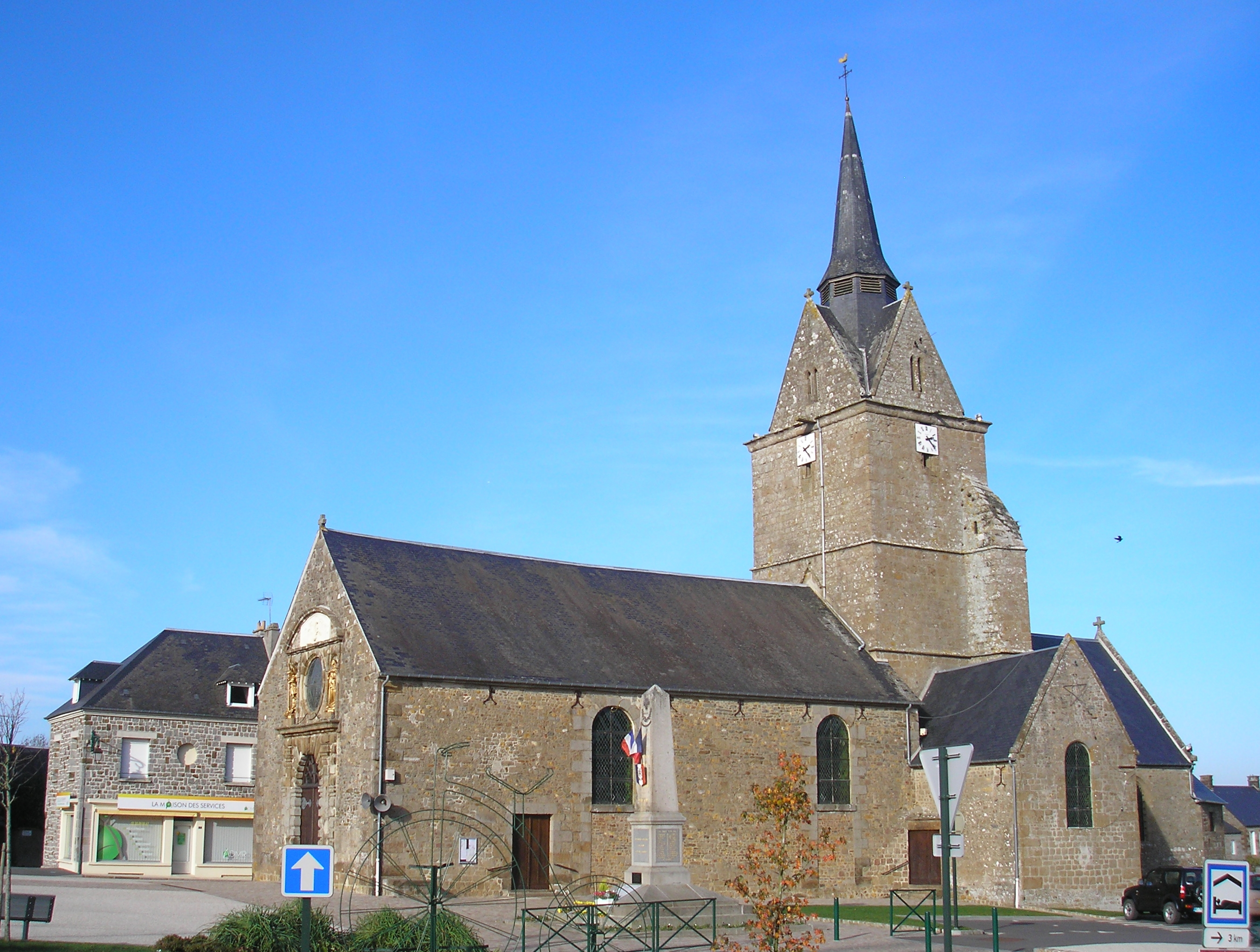 Rânes (Normandie, France). L'église Notre-Dame-de-l'Assomption.